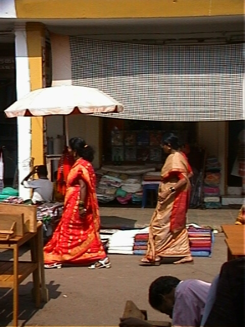 Indiase vrouwen in sari. eigen foto gemaakt in Goa (2004)